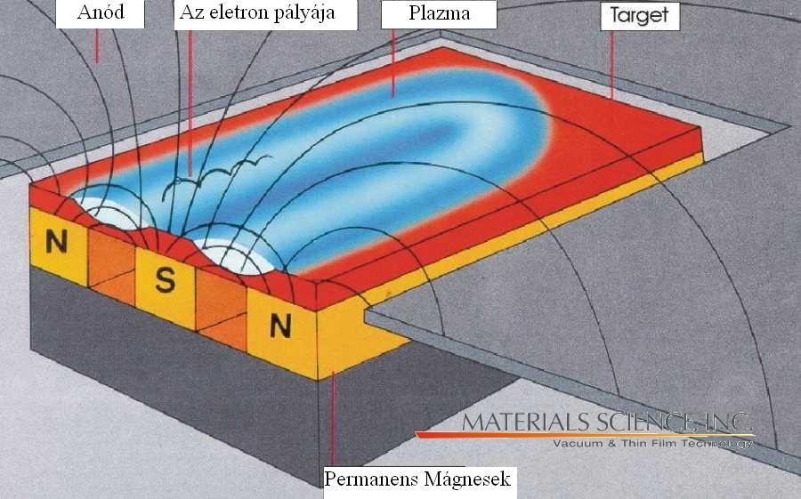 A permanens mágnes a katód mögött helyezkedik el , eltéritve az elektronok pályáját